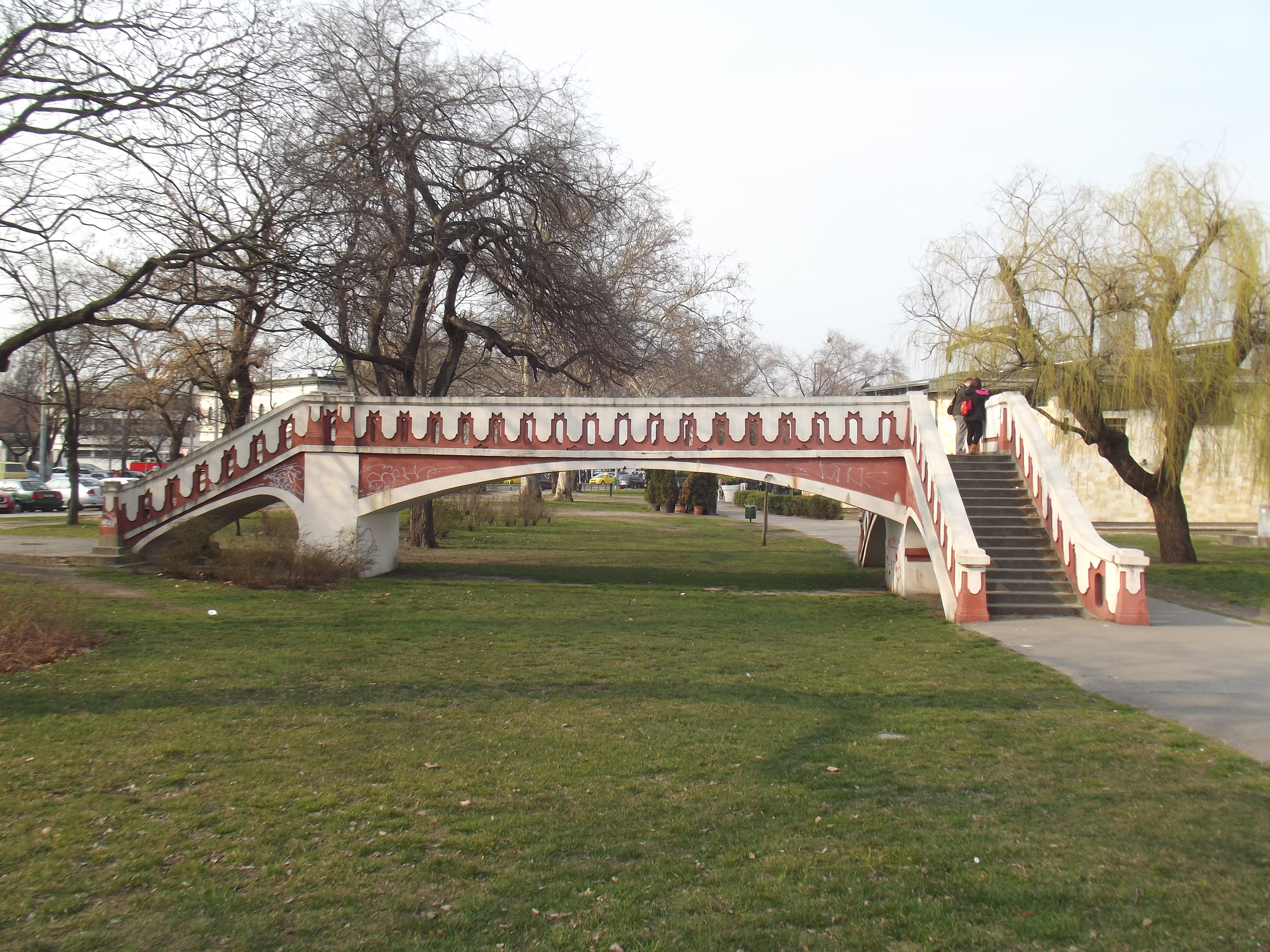 Zabytkowy voetgangersbrug over de metrolijn 1 die nu verplaatst is.